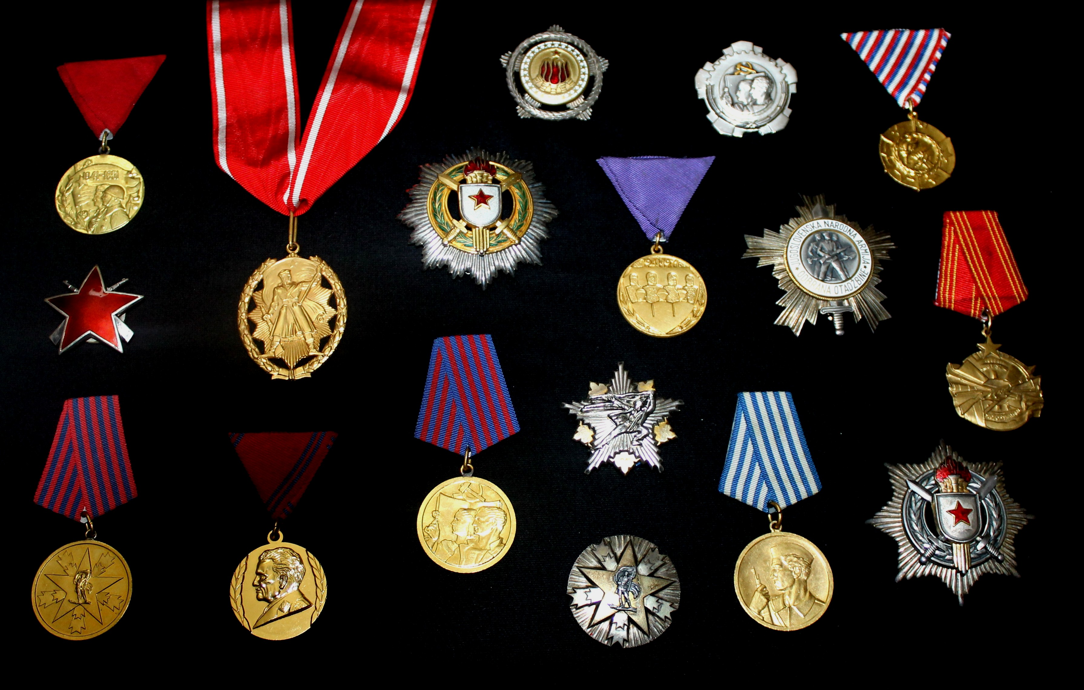 Одликовања СФРЈ: Орден братства и јединства, Орден народног хероја, Орден за војне заслуге, Медаља рада, Медаља за храброст и Партизанска споменица 1941.